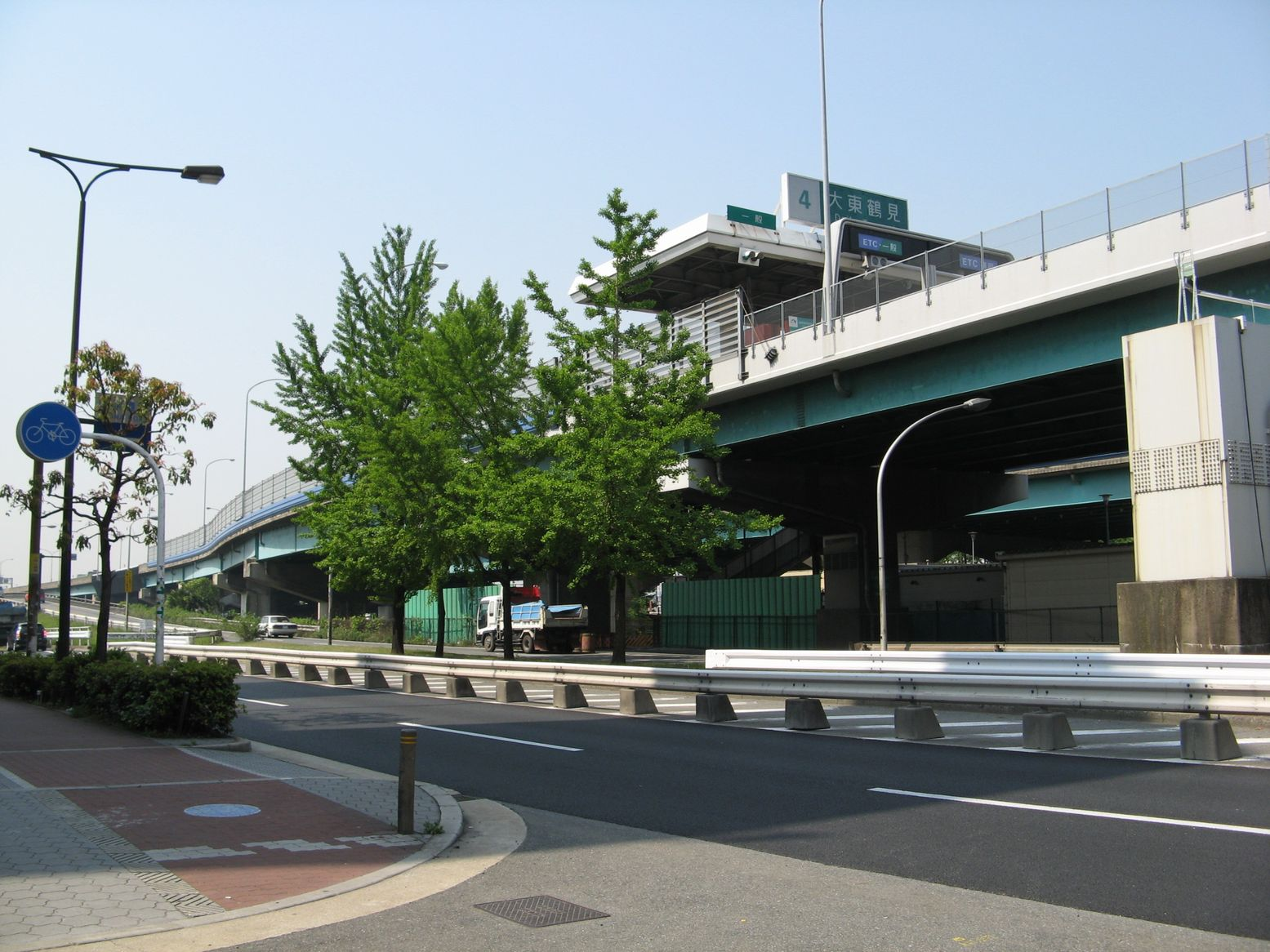 近畿自動車道 大東鶴見IC 高架下の鶴見区茨田大宮2丁目から料金所を南西望